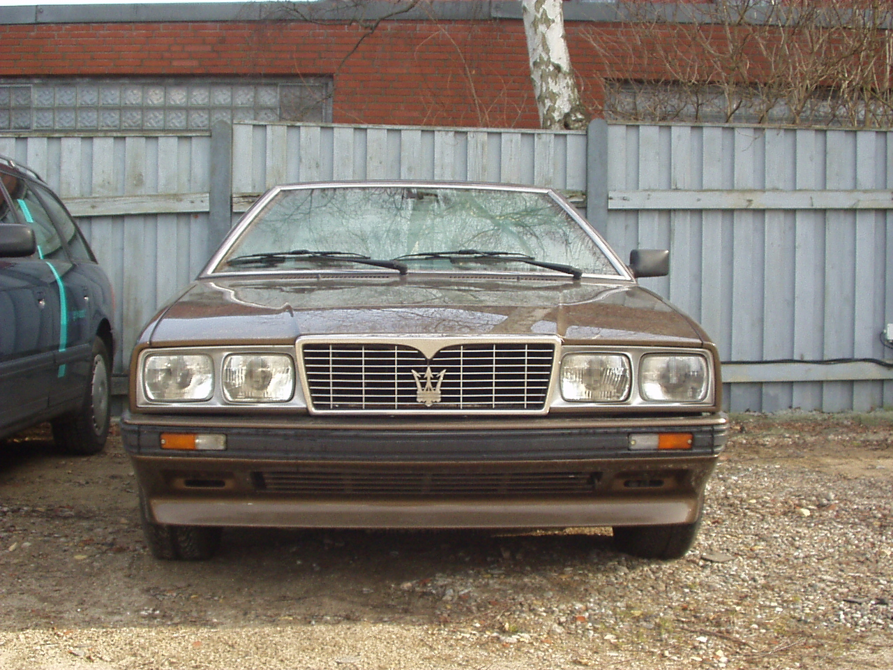 Maserati Biturbo Frontalansicht